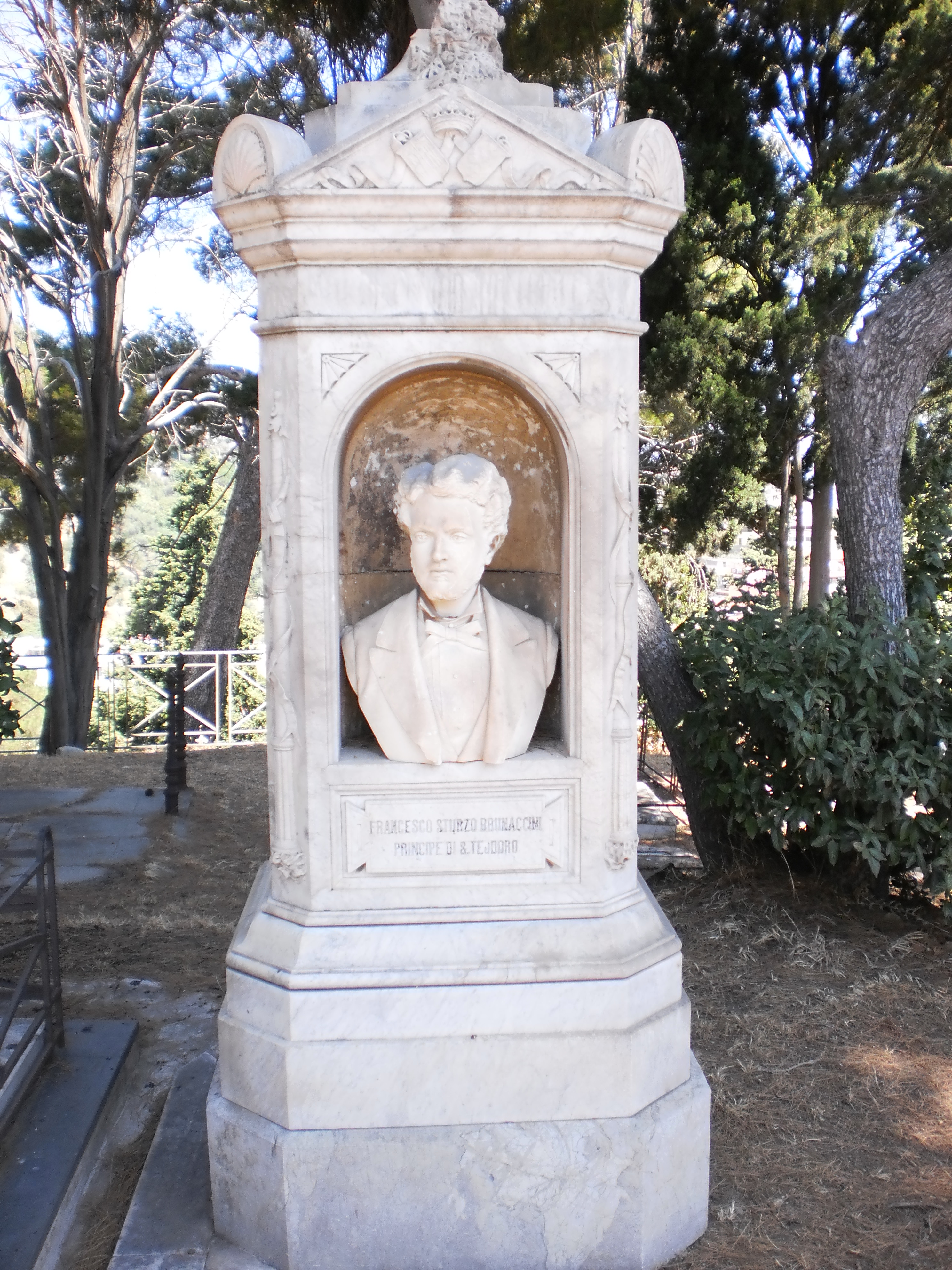 Monumento funerario del principe di San Teodoro.